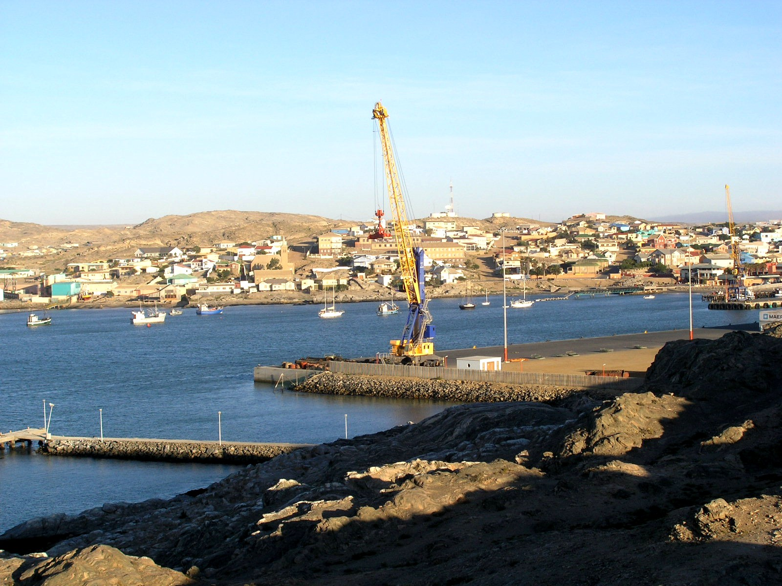 Luderitz, Blick von der Haifischinsel